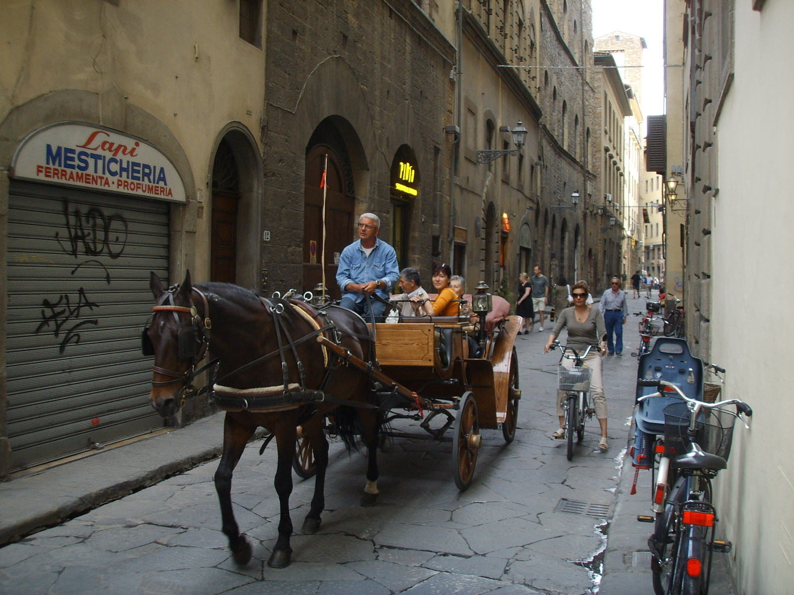 Borgo santi apostoli